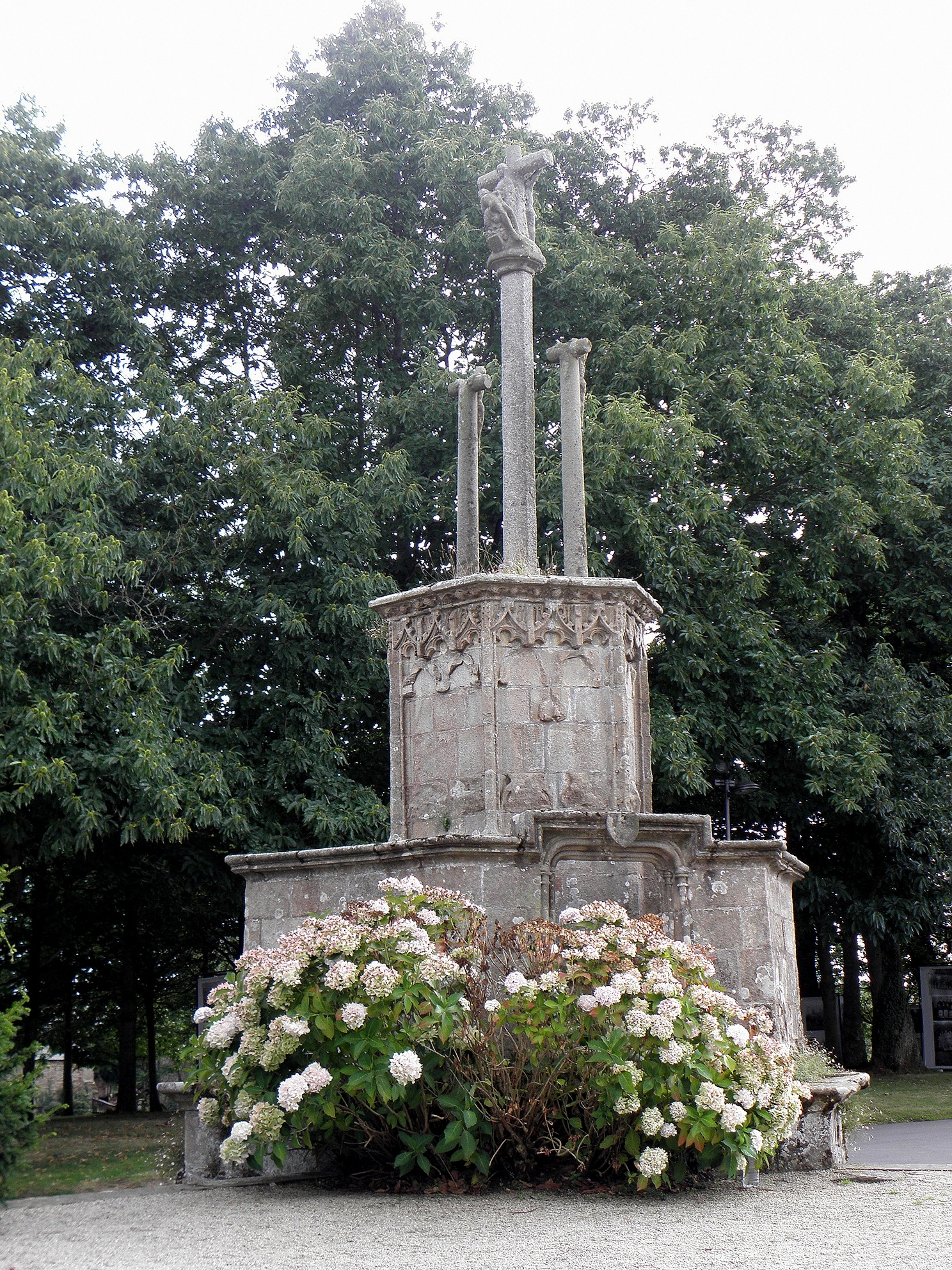 Chaire-calvaire de l'église Notre-Dame de Runan (22). .